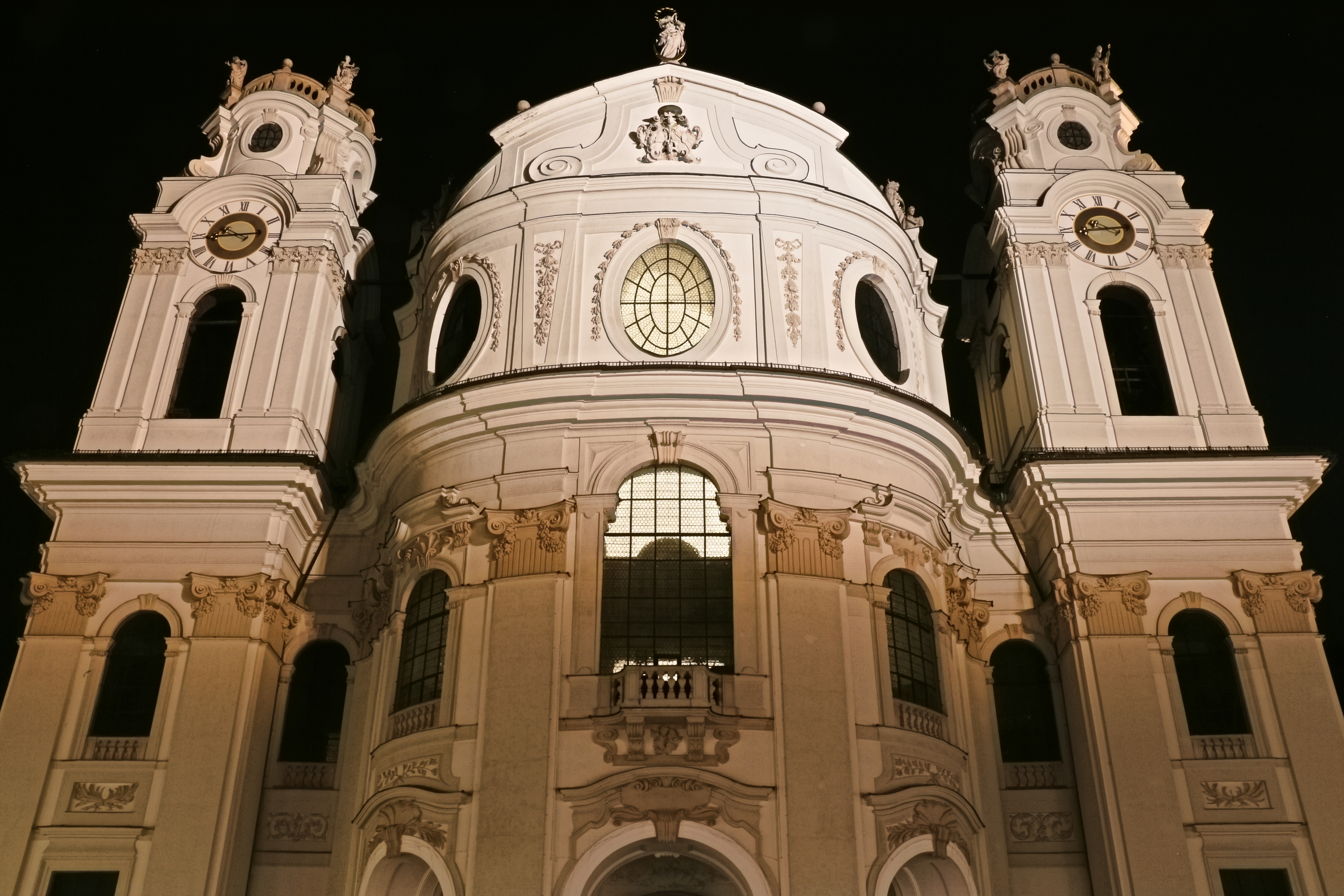 Kath. Pfarrkirche, Kollegienkirche, Universitätskirche, Salzburg, Front